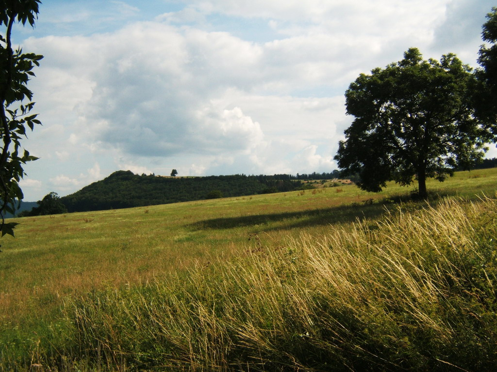 Die Krücke oberhalb von Oepfershausen